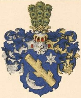 Albedylli suguvõsa aadlivapp